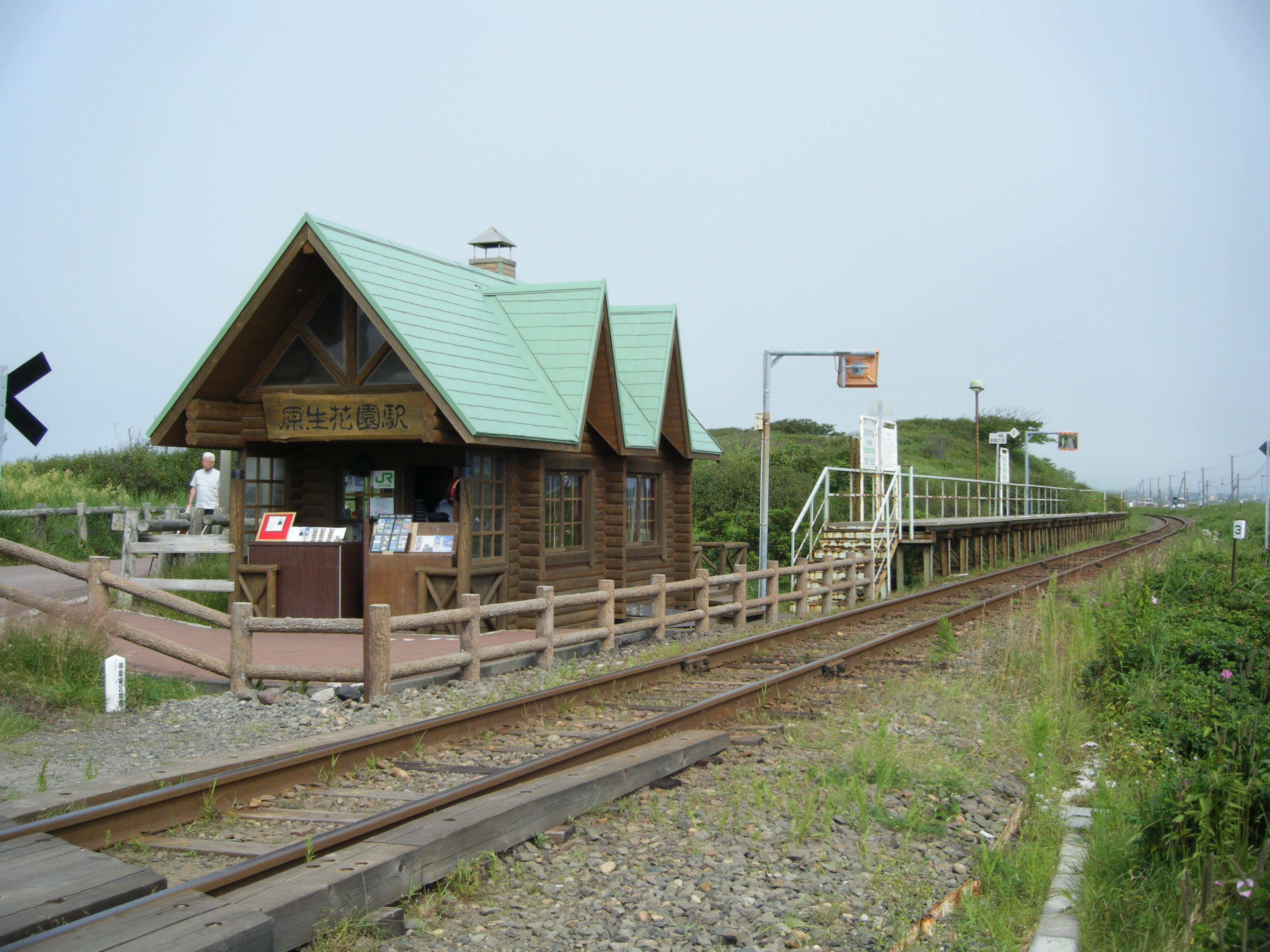 原生花園駅（JR北海道、釧網本線）。